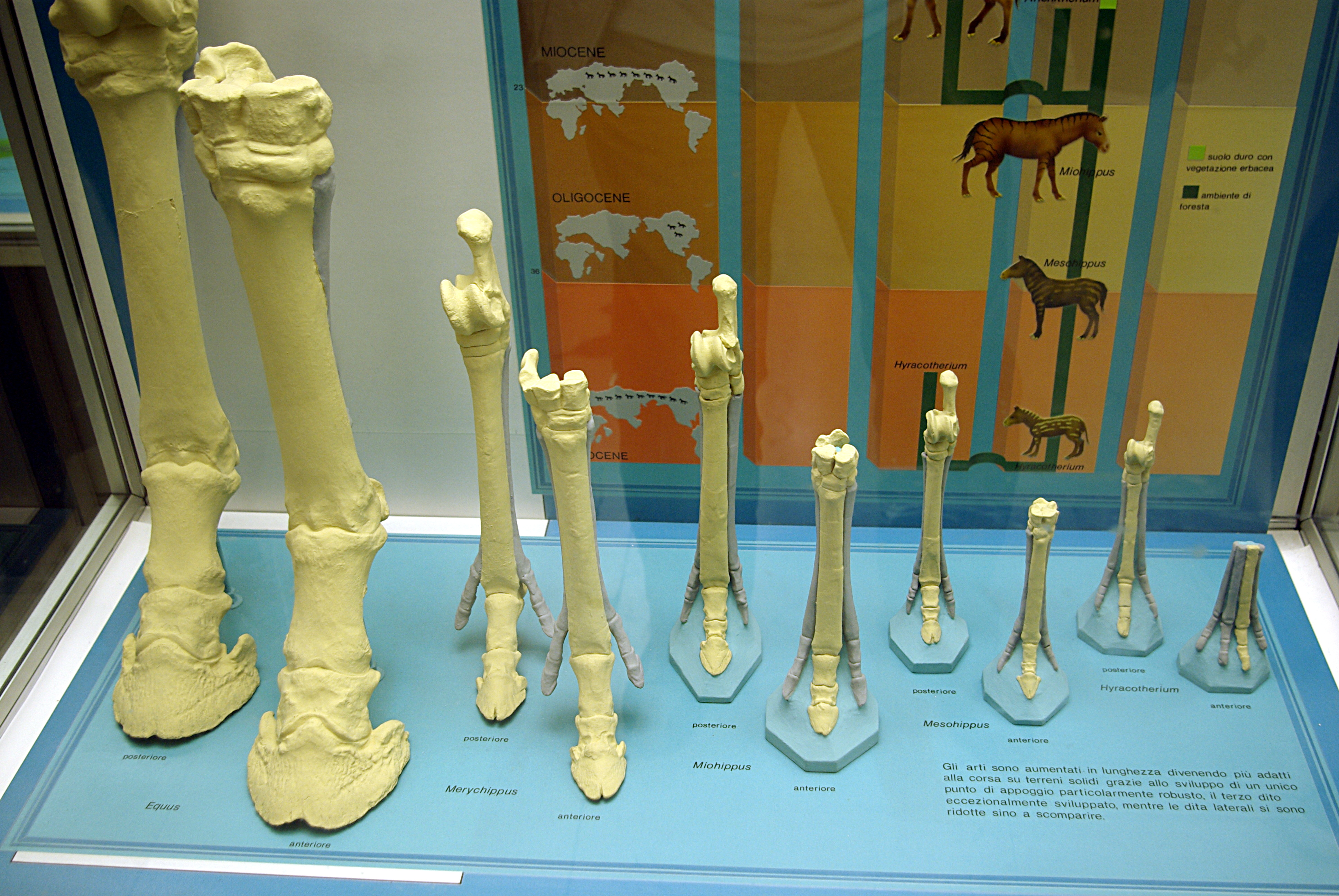 Evoluzione dell zampa del cavallo alato